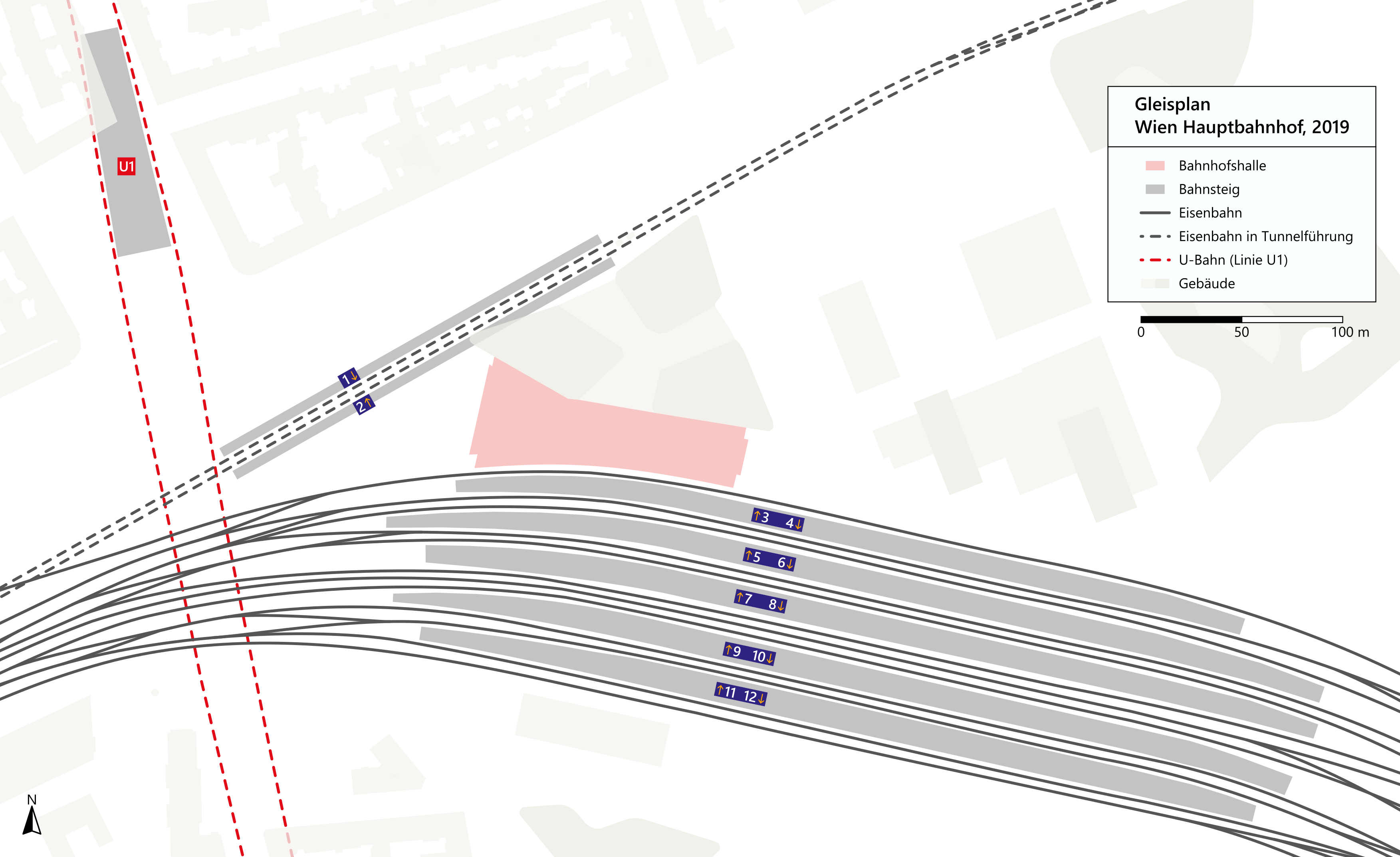 Plan des Wiener Hauptbahnhofs mit seinen Bahnsteigen sowie den Gleisen der ÖBB (ohne Bahnsteige 13–16) und U-Bahn (U1).